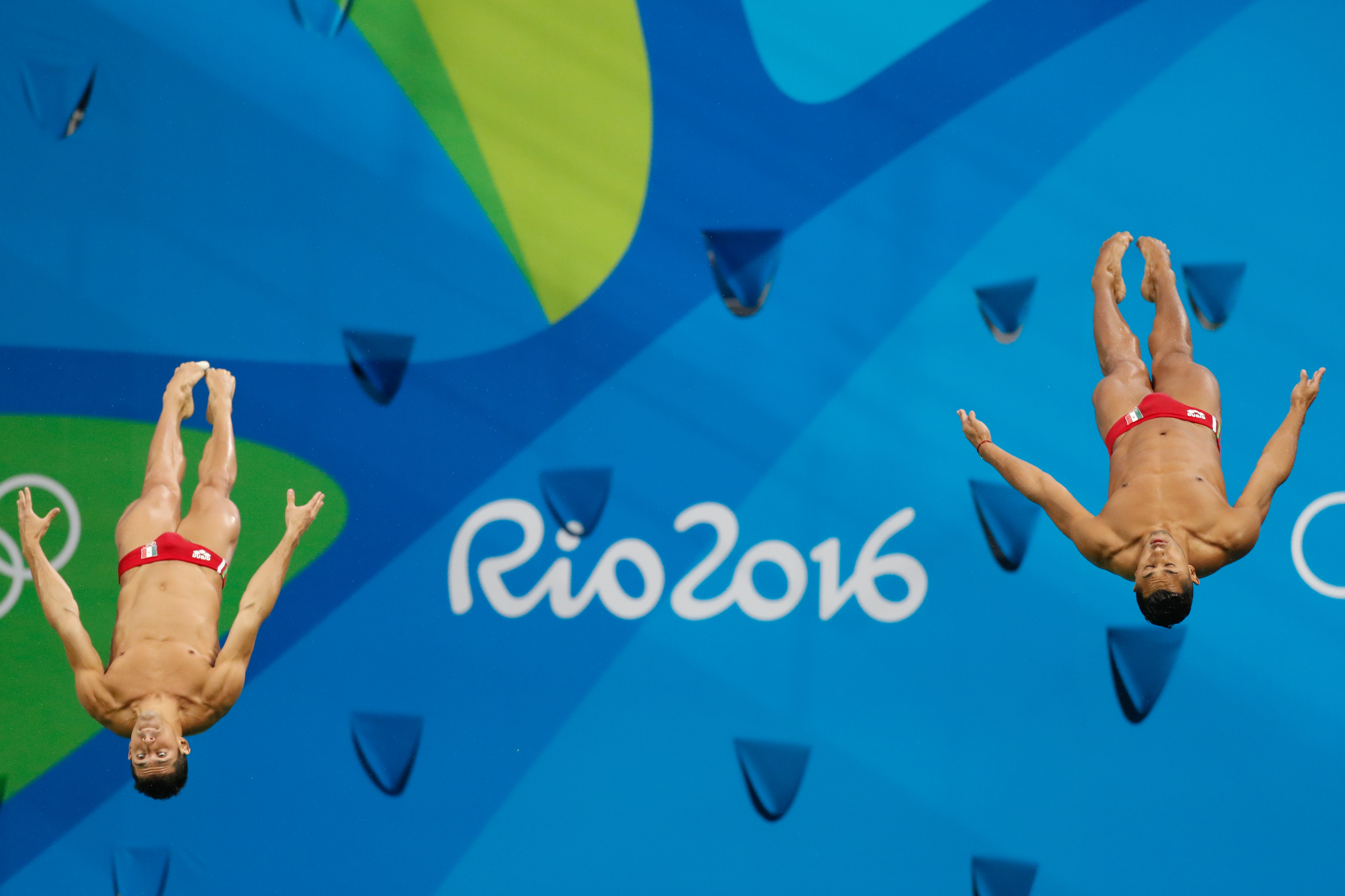 Rio de Janeiro - Mexicanos Jahir Ocampo e Rommel Pacheco competem no trampolim de 3 metros sincronizado dos saltos ornamentais nos Jogos Olímpicos Rio 2016 , no Parque Aquático Maria Lenk (Fernando Frazão/Agência Brasil)